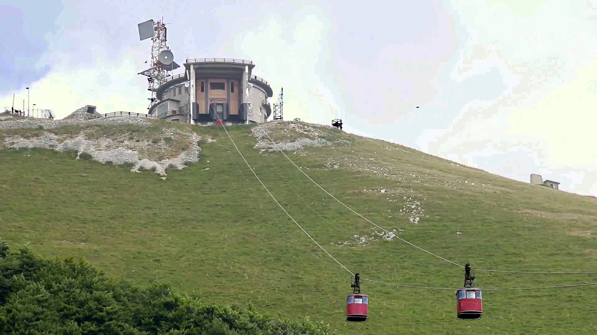 Funivia che collega il paese di Pian de' Valli con la sommità del monte Terminilluccio - gruppo del monte Terminillo, provincia di Rieti